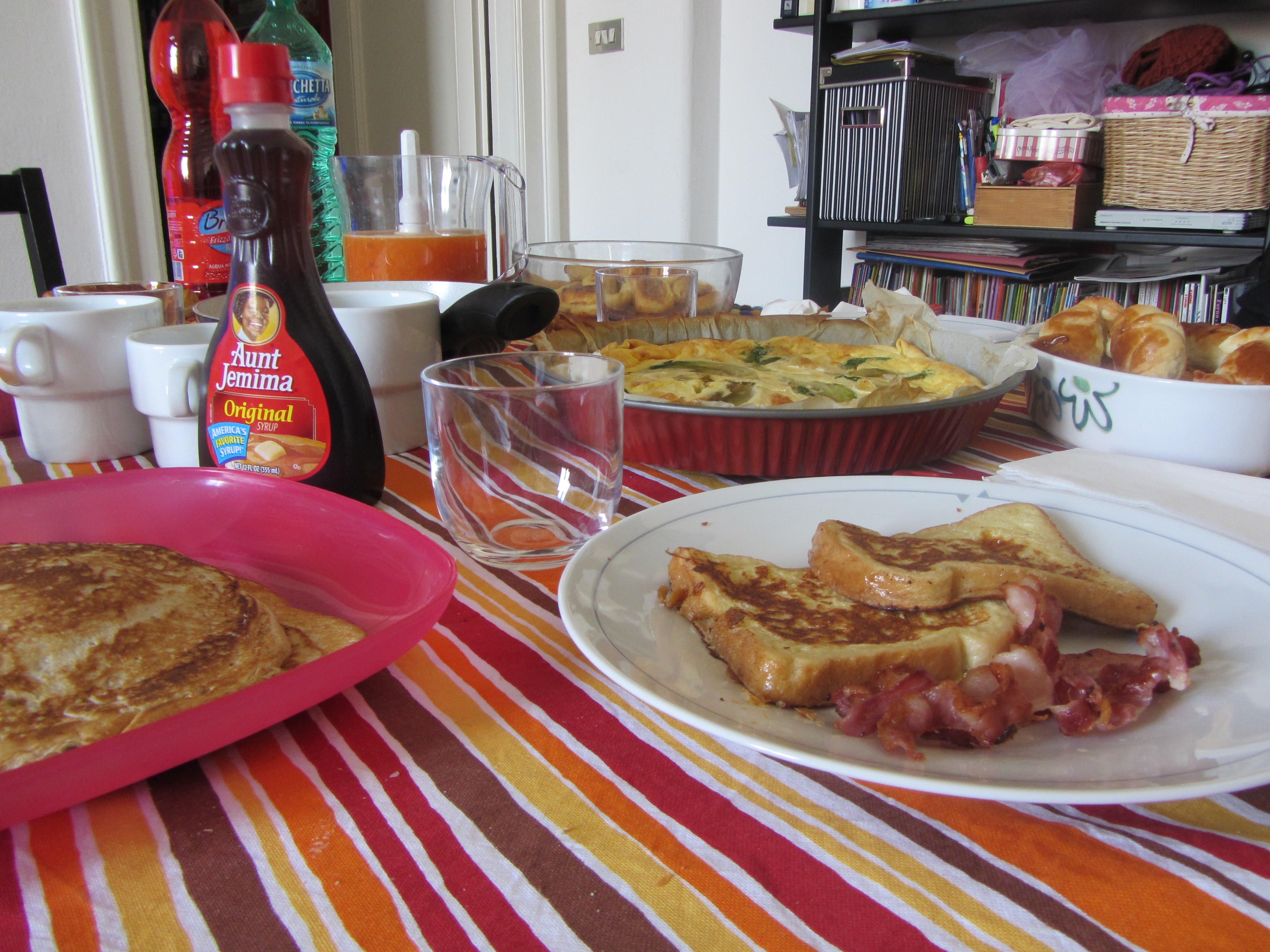 una colazione / brunch italiana ( in stile americano e italiano misto) con: toast inzuppato nell'uovo e cotto nel burro, bacon a fette grigliato, pancakes, sciroppo di zucchero e acero, salsicce in padella al cognac, torta salata al prosciutto scamorza e verdure, capuccino, spremuta d'arancia, acqua, focaccine al parmigiano, cornetti di pasta sfoglia con nutella